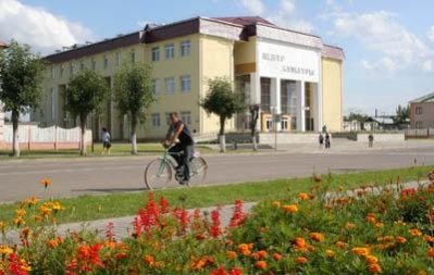 белыничи город